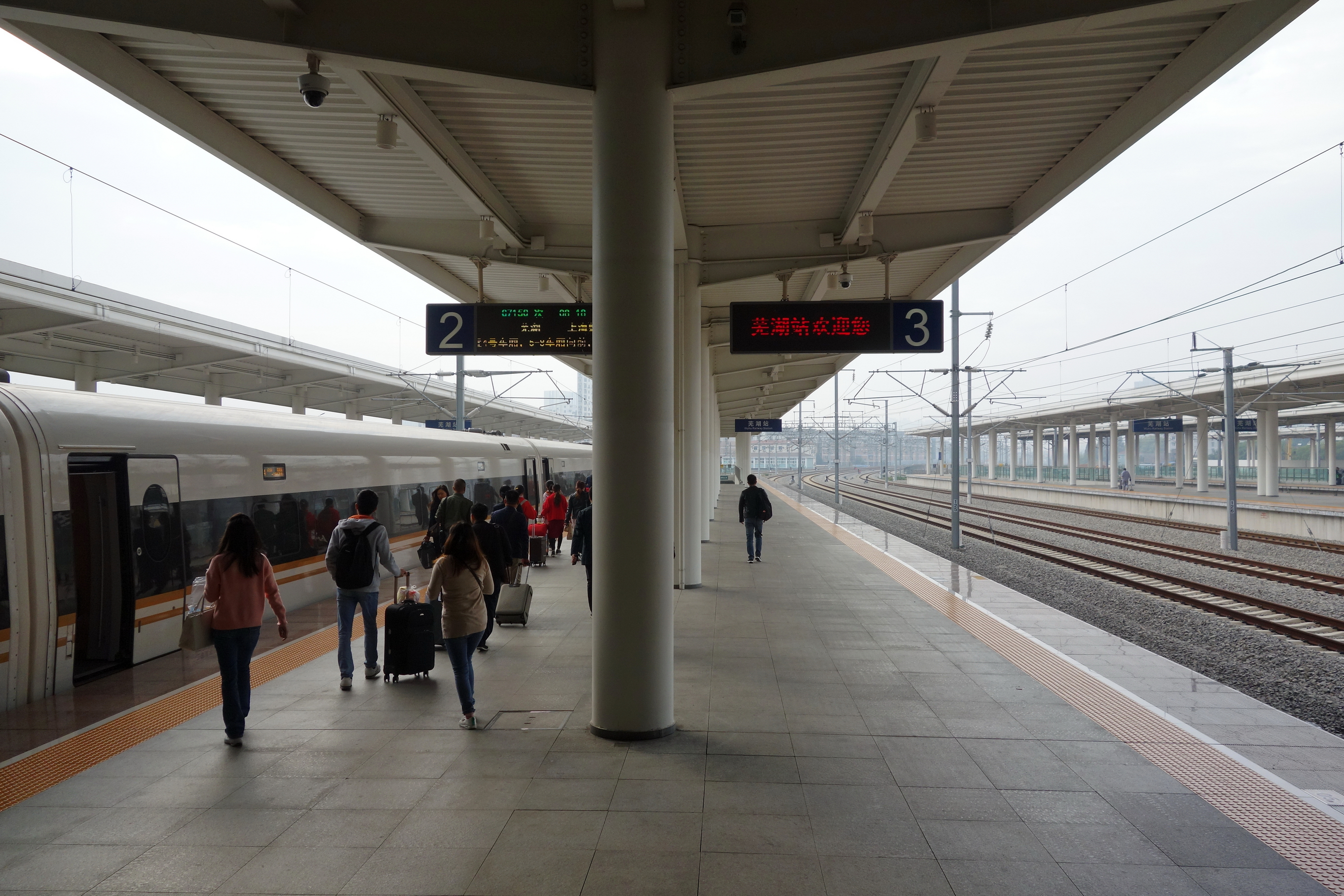 芜湖站站台